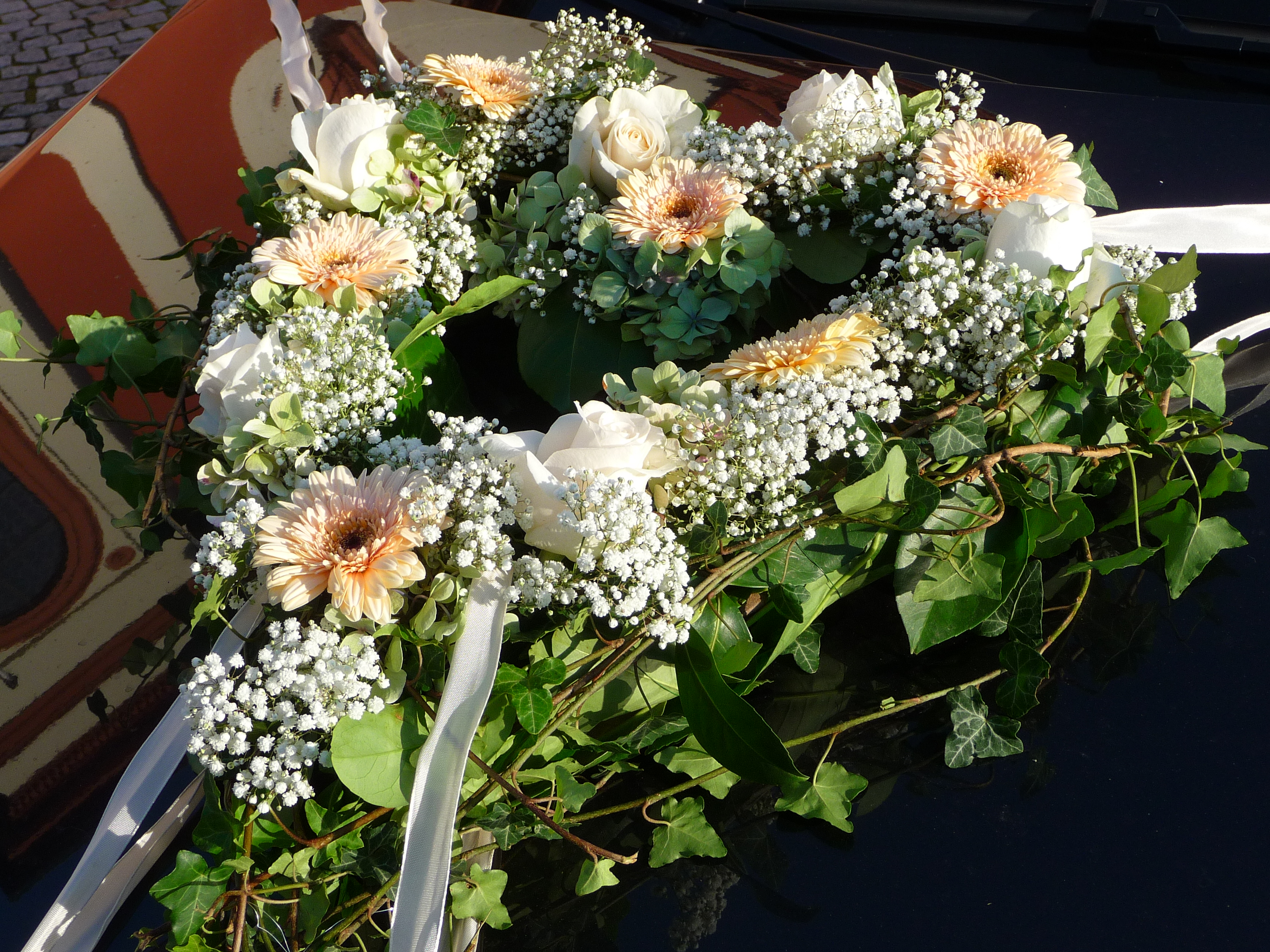 mit Bukett in Herzform geschmücktes Auto eines Hochzeitspaares